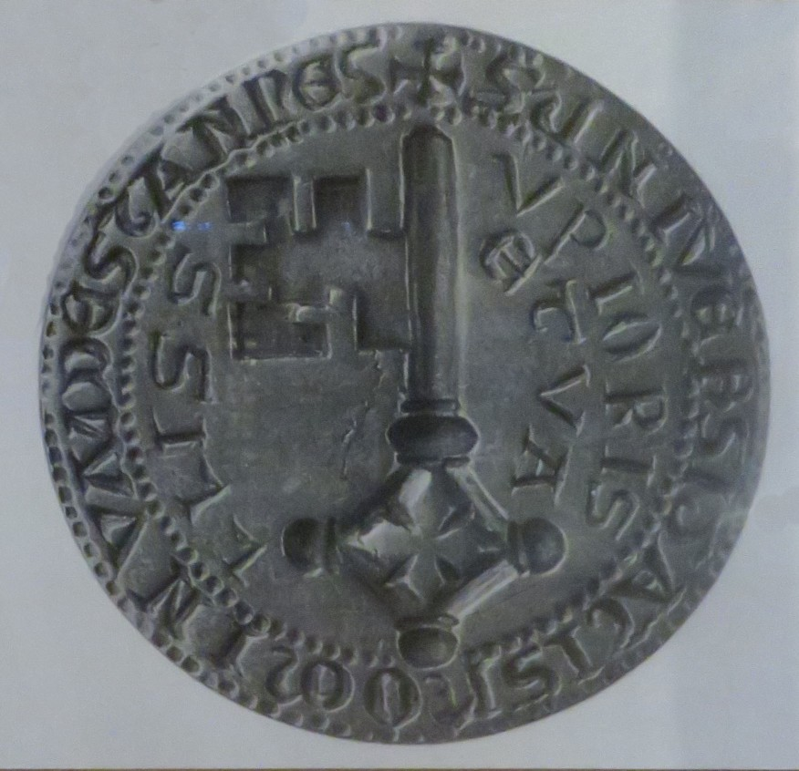 Das Siegel von Unterwalden und Obwalden, siehe Fahne und Wappen des Kantons Obwalden